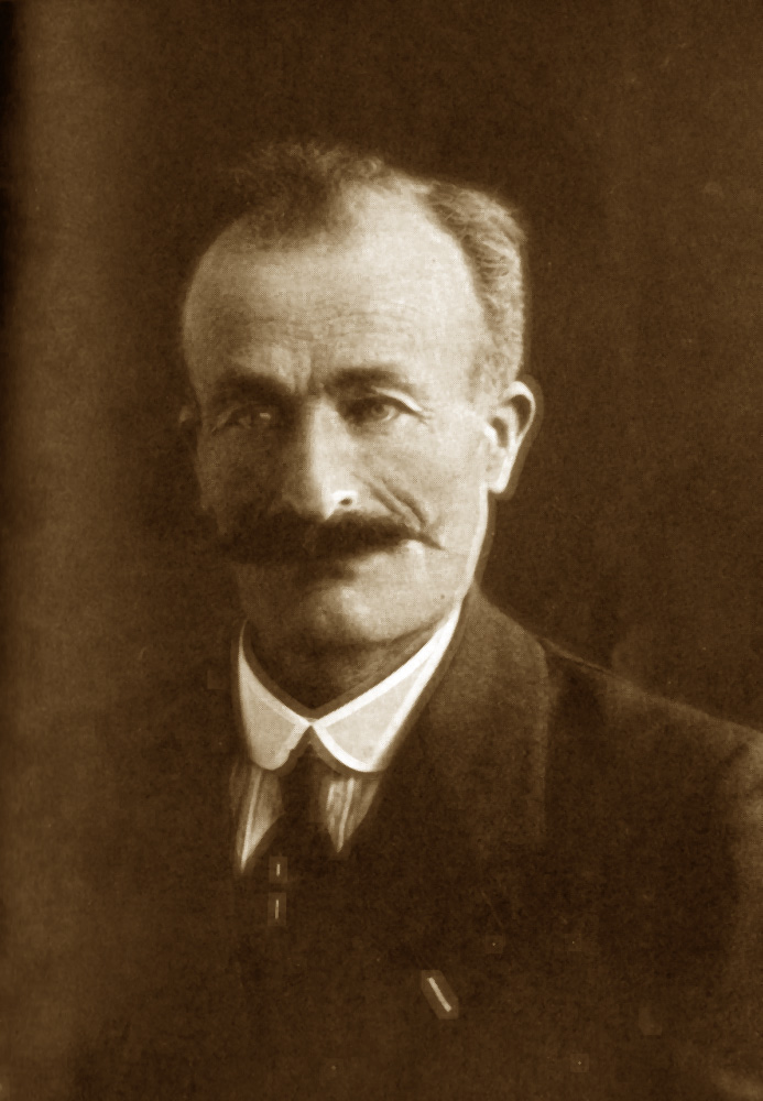 Frédéric Lazard (1862-1945), préhistorien, maire deSivergues.